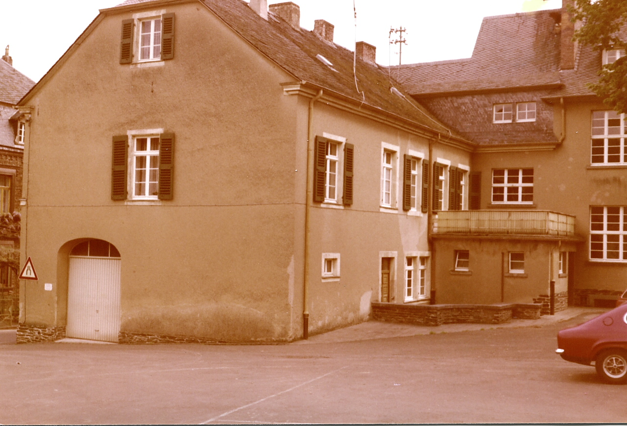 Alte Lösnicher Schule vor dem Umbau zur Bürgerhalle 1981.